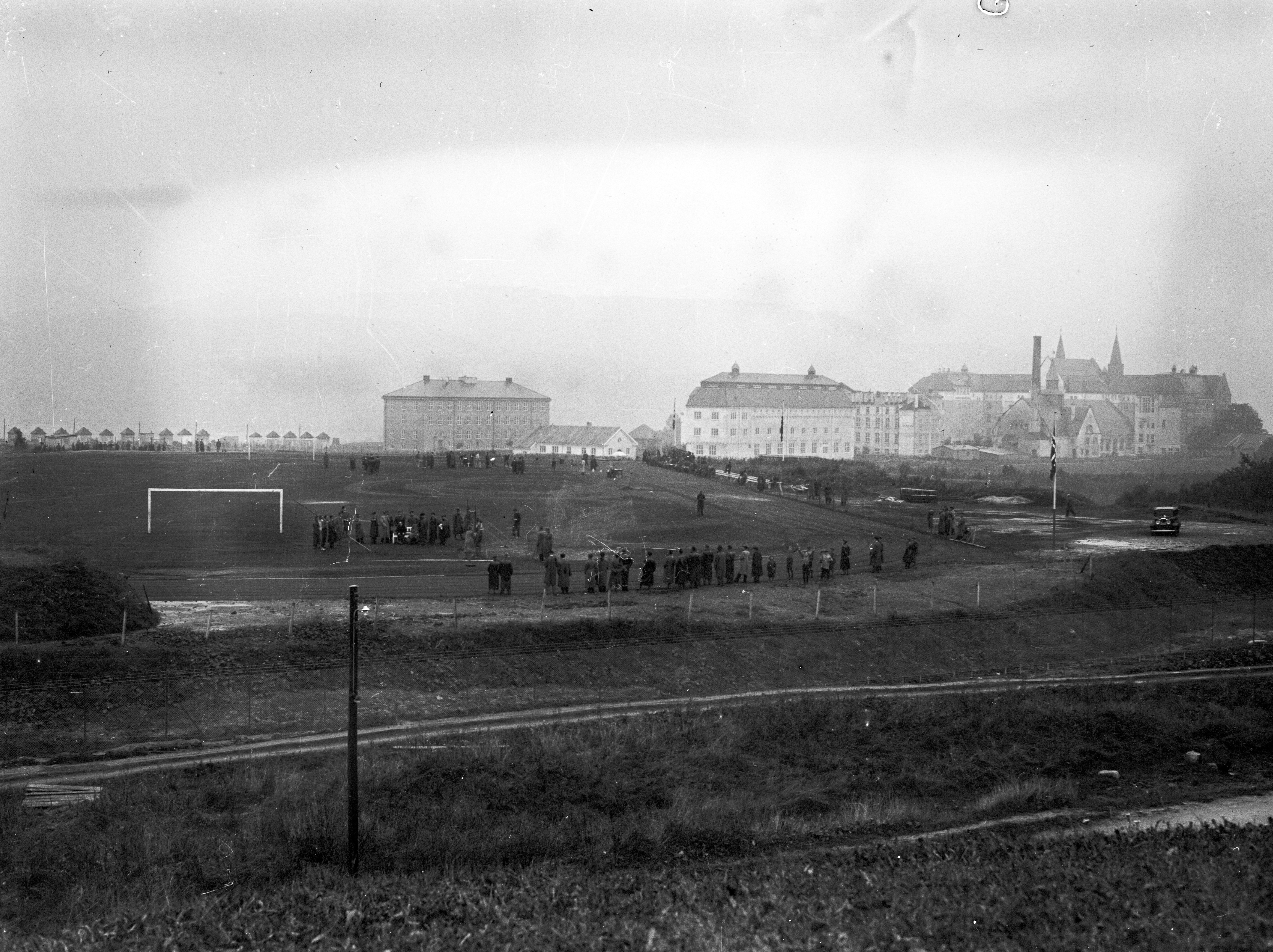 Idrettsplass for NTHi sør på Gløshaugen-platået. Plassen ble opparbeidet som kommunalt nødarbeid. Sto ferdig sommeren 1934. Sterkt ødelagt under krigen. Ikke opparbeidet på ny etter krigen. NTH skulle ha arealene til utbygging